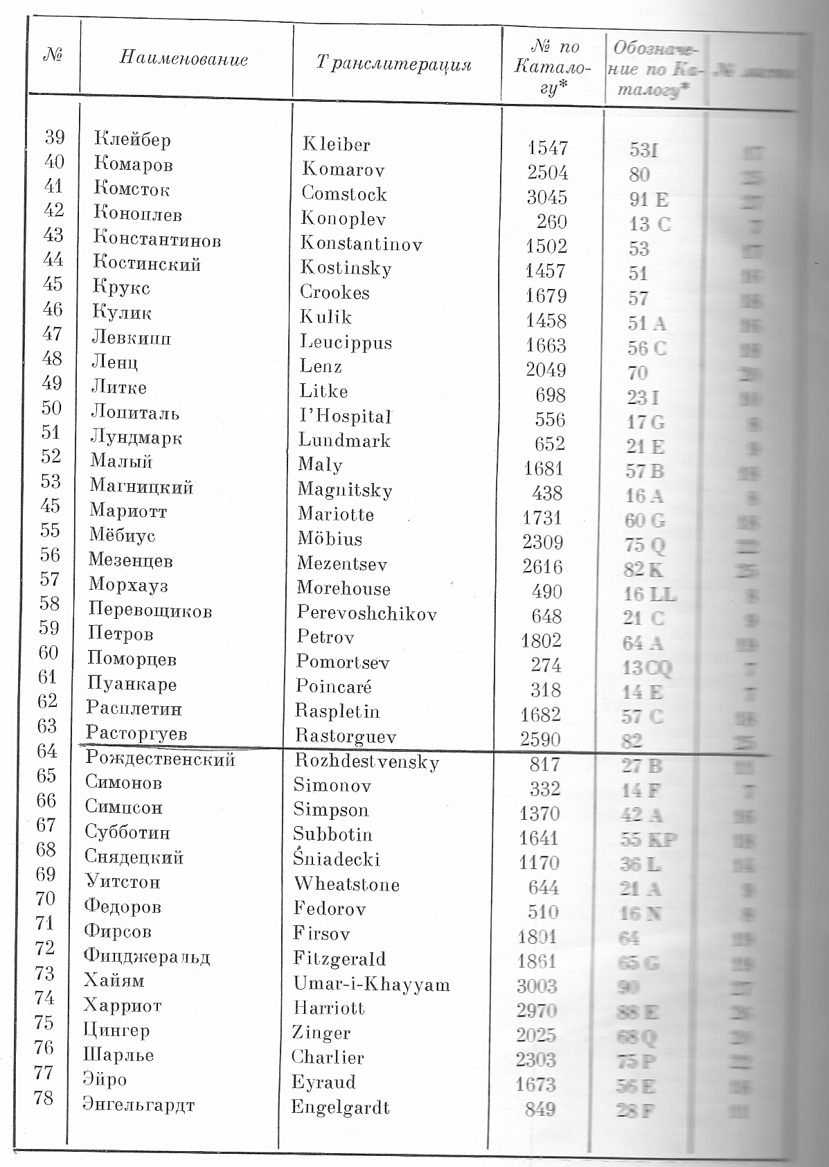 Страничка и лунного атласа подаренного Глушко жене пилота